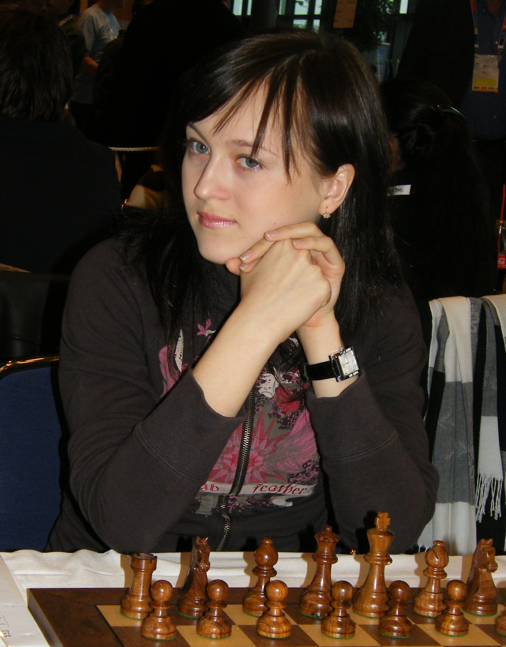 Ukrajinská šachistka Anna Ušeninová na 38. šachové olympiádě v Drážďanech v roce 2008